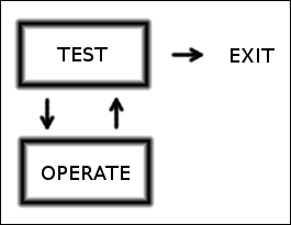 Diagramma TOTE (Test-Operate-Test-Exit). Come descritto nel testo "Piani e struttura del comportamento" di Miller, Pribram, Galanter.